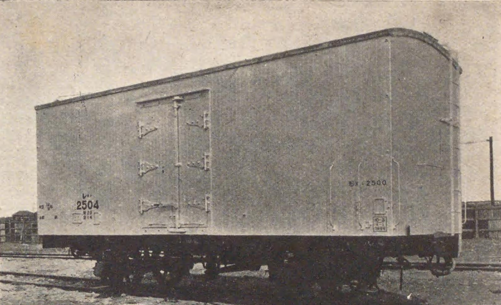 鉄道省レ2500形貨車（冷蔵車）。